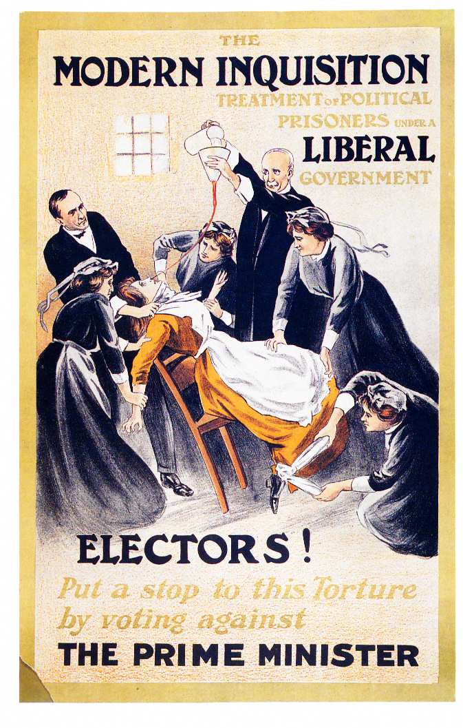 A. Patriot, i.e. Alfred Pearse, Modern Inqusition 1910